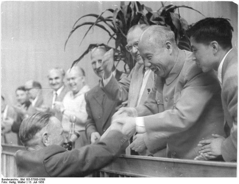 Zentralbild Heilig 13.7.1958. V. Parteitag der SED vom 10. bis 16.7.1958 in der Werner-Seelenbinder-Halle, Berlin, 4. Tag: UBz: Zu einem imposanten Ausdruck des festen Bündnisses zwischen der Arbeiterklasse und der werktätigen Bauernschaft unter der Führung der Partei der Arbeiterklasse gestaltete sich der Empfang einer Delegation aus der Land- und Forstwirtschaft. Stürmischer Beifall brandete auf, als der Sprecher der Delegation, Meisterbauer Erich Himmelreich, den Mitgliedern des Präsidiums herzlich die Hand drückte. (2. von rechts): das Mitglied des Politbüros des ZK der KP Chinas, Dung Bi-wu, (3. von rechts): MInisterpräsident Otto Grotewohl, (4. von rechts): der Erste Sekretär des ZK der SED, Walter Ulbricht.